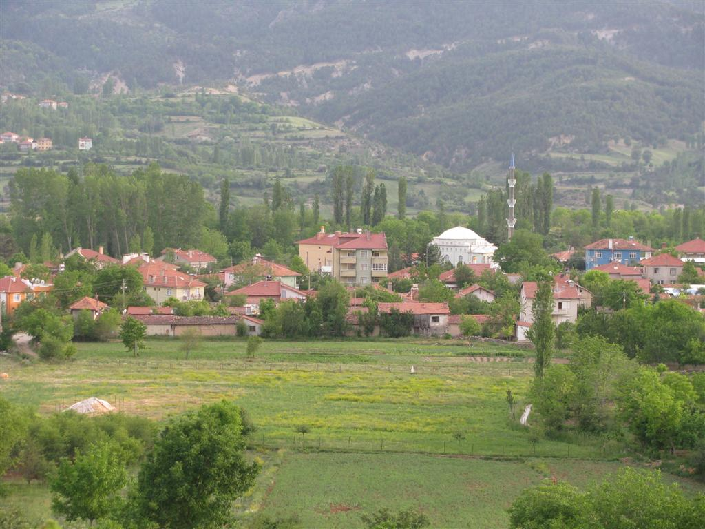 Korudan genel görünüs